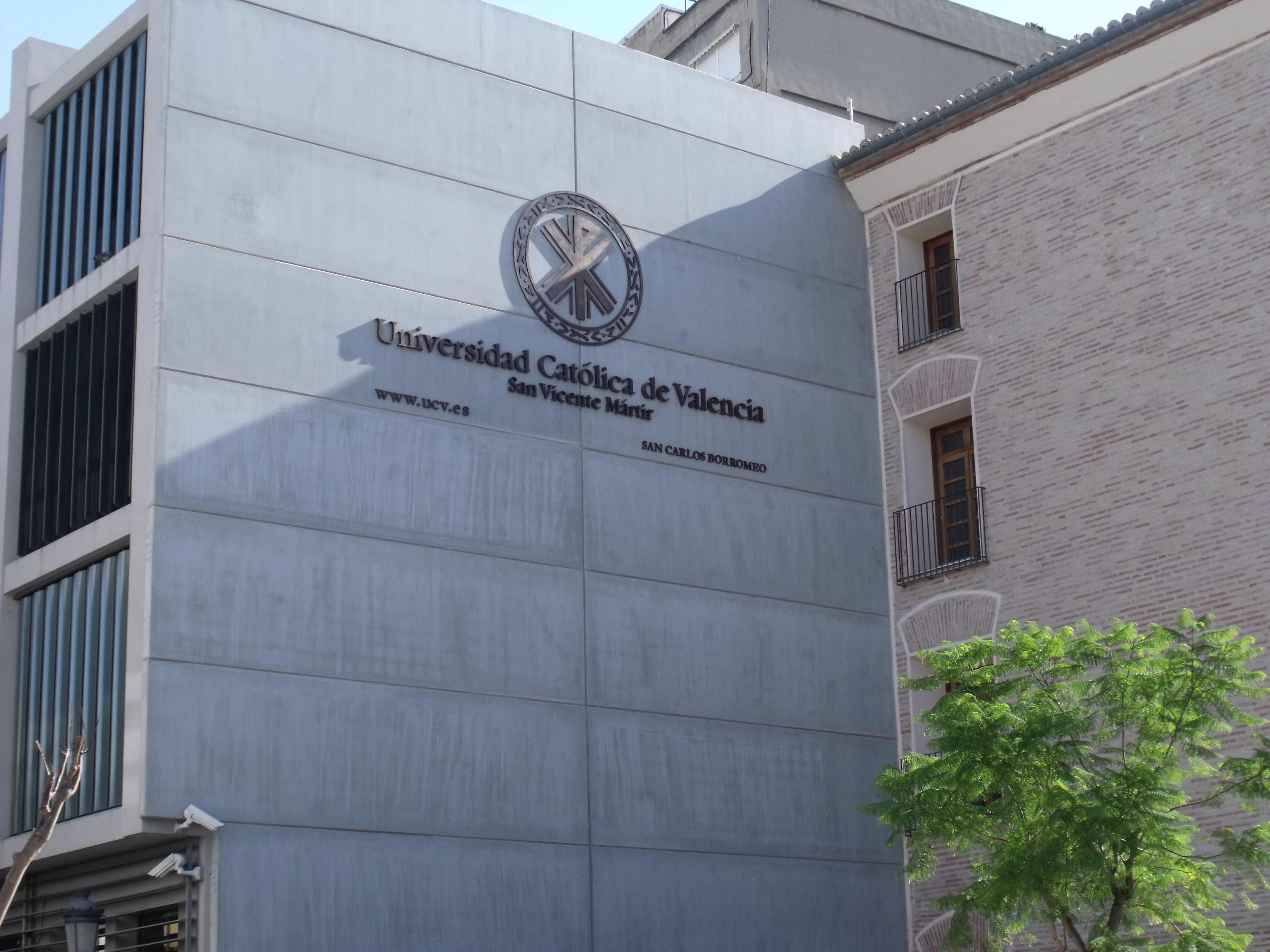 Sede de la Universidad Católica de Valencia en la antigua Iglesia de San Carlos Borromeo